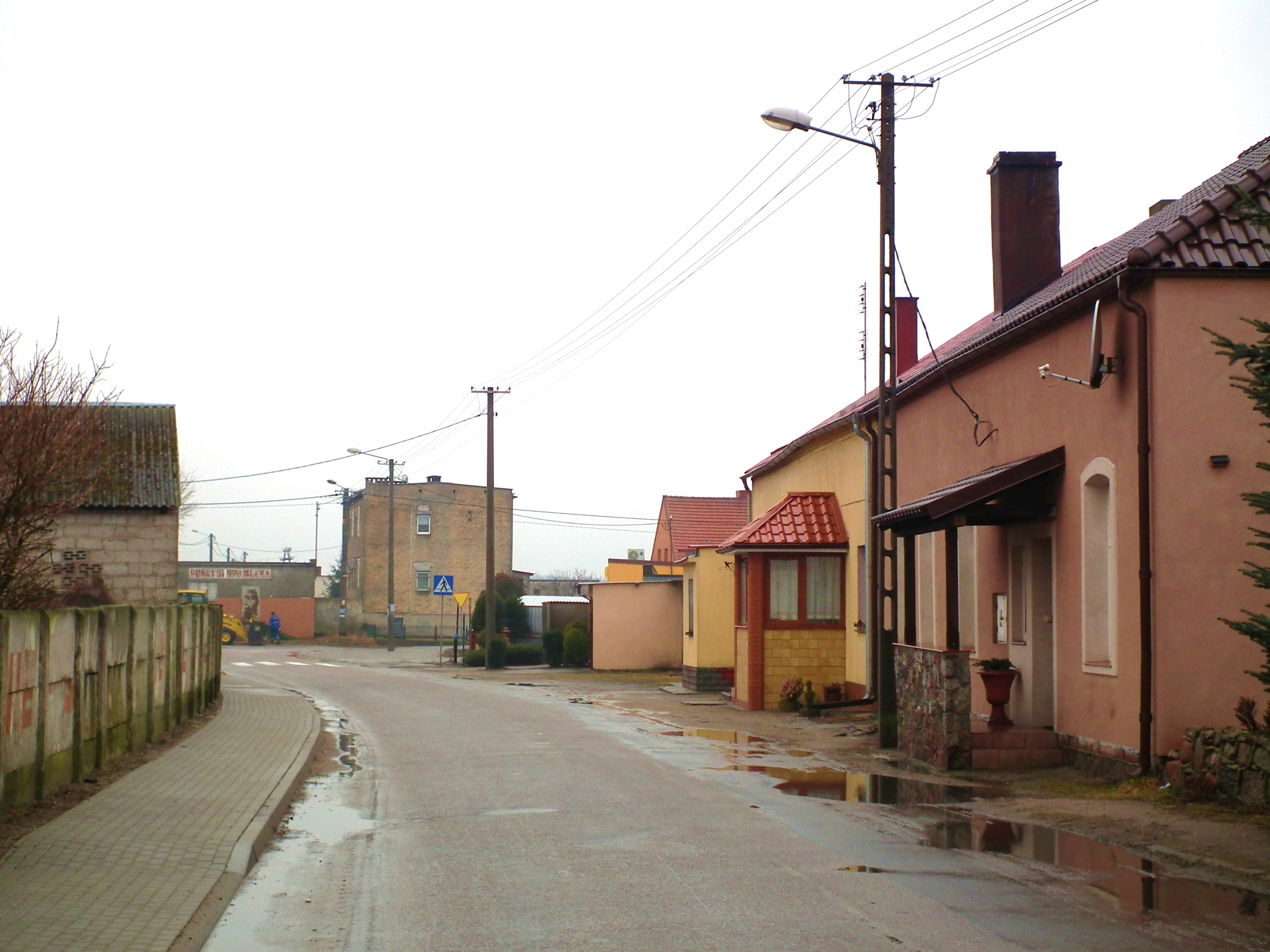 Wieś Kleszczyna koło Złotowa.